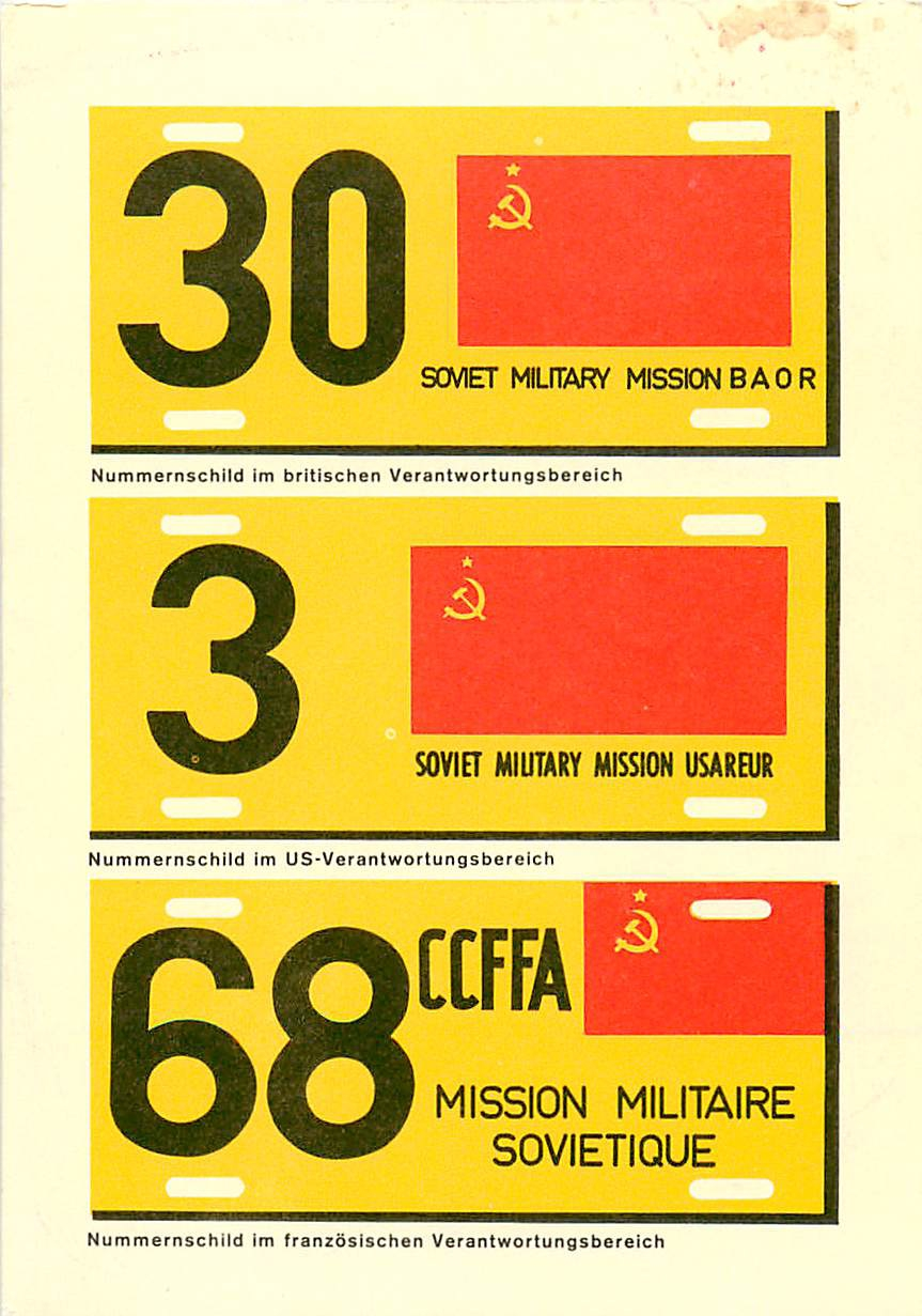 Kfz Schilder der Sowjetischen Milität Mission 1977